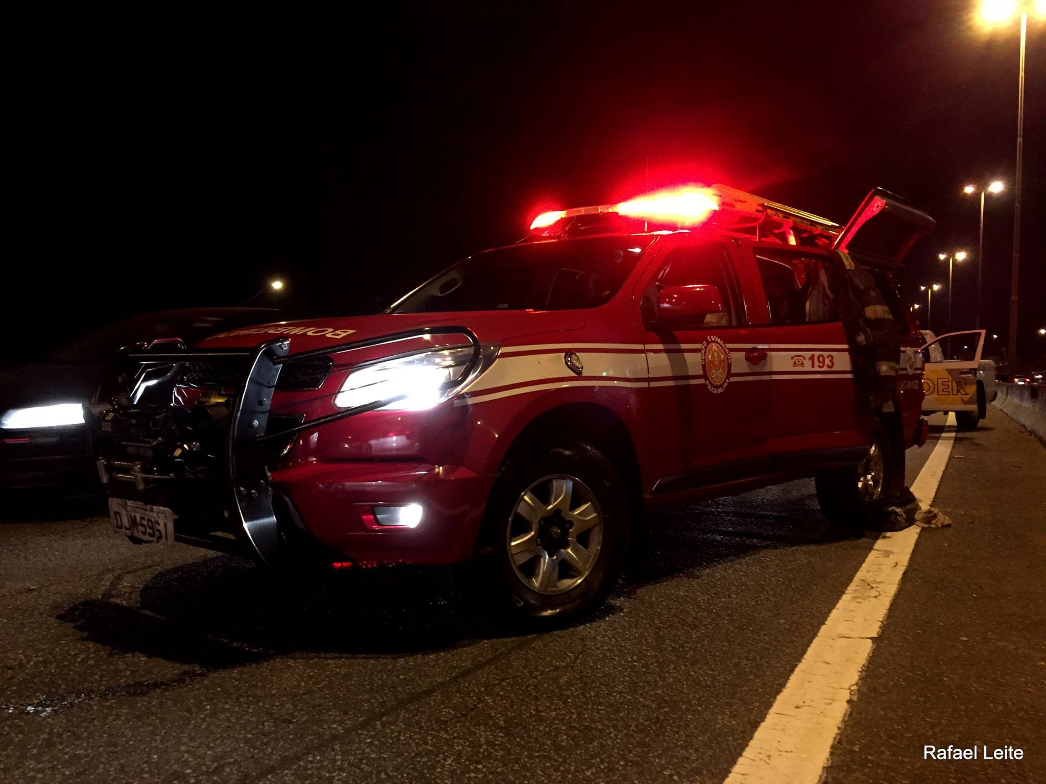 Comando de Área 4A S10